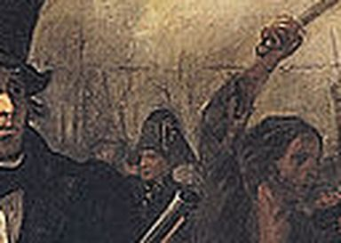 Zoom al barret dels estudiants de l'escola politècnica, que no s'ha de confondre amb els dels militars, ja que estàven contra els monàrquics a la revolució de Julioll.